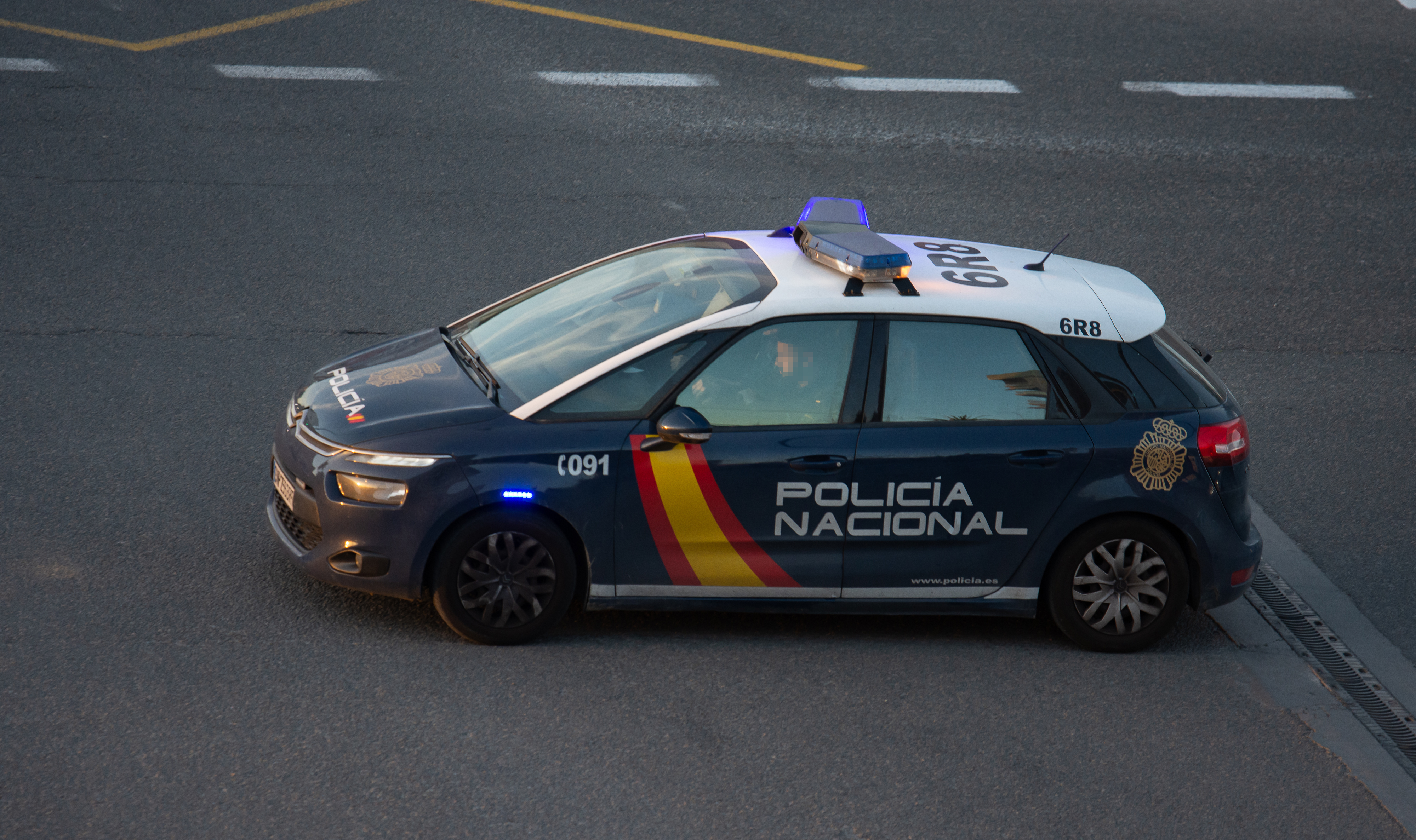 Automóvil de la policía nacional española en Valencia.